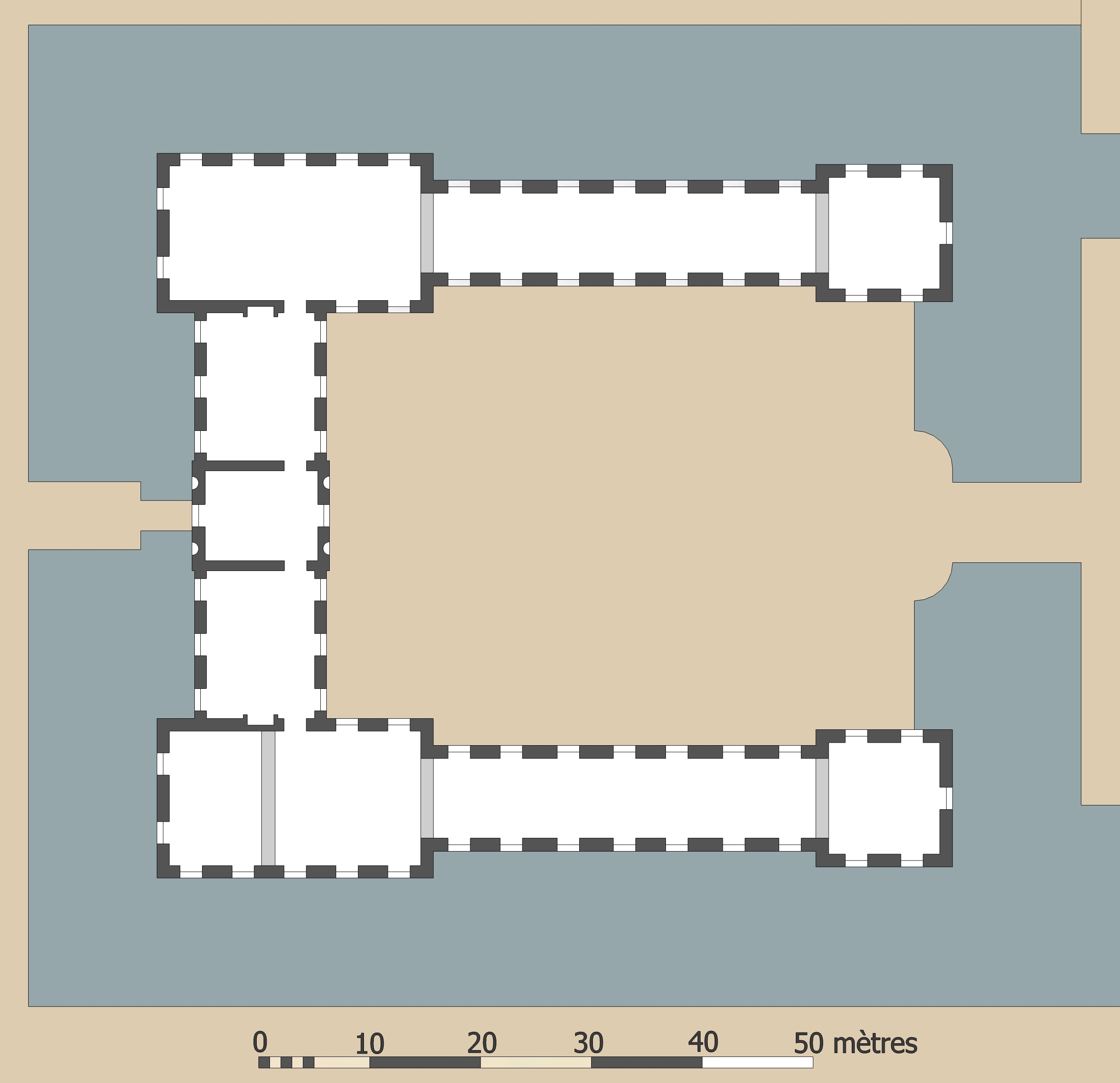 Plan inédit du premier étage du château de Chilly.